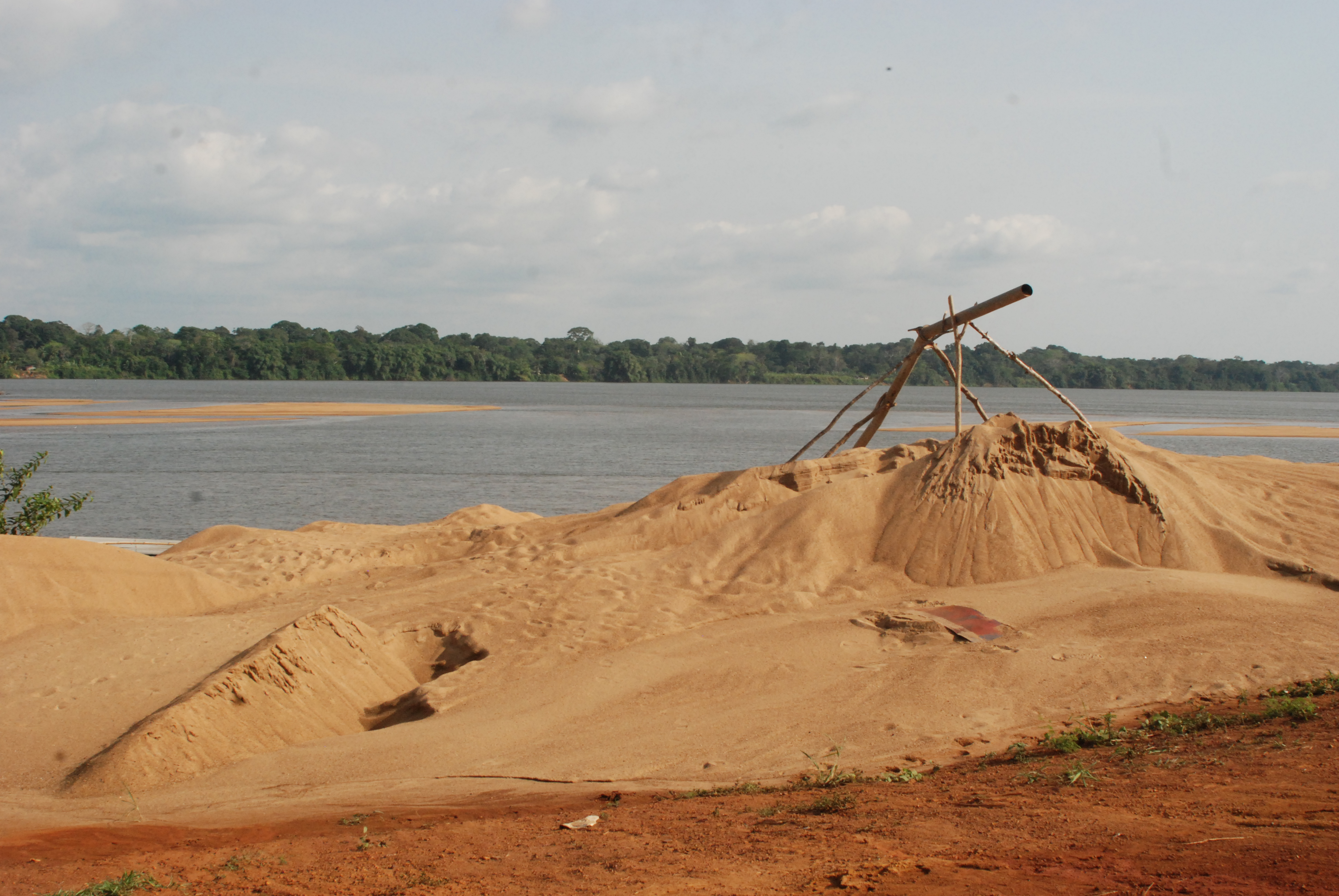 Les alentours du fleuve Sanaga à Edea dans la région du Littoral